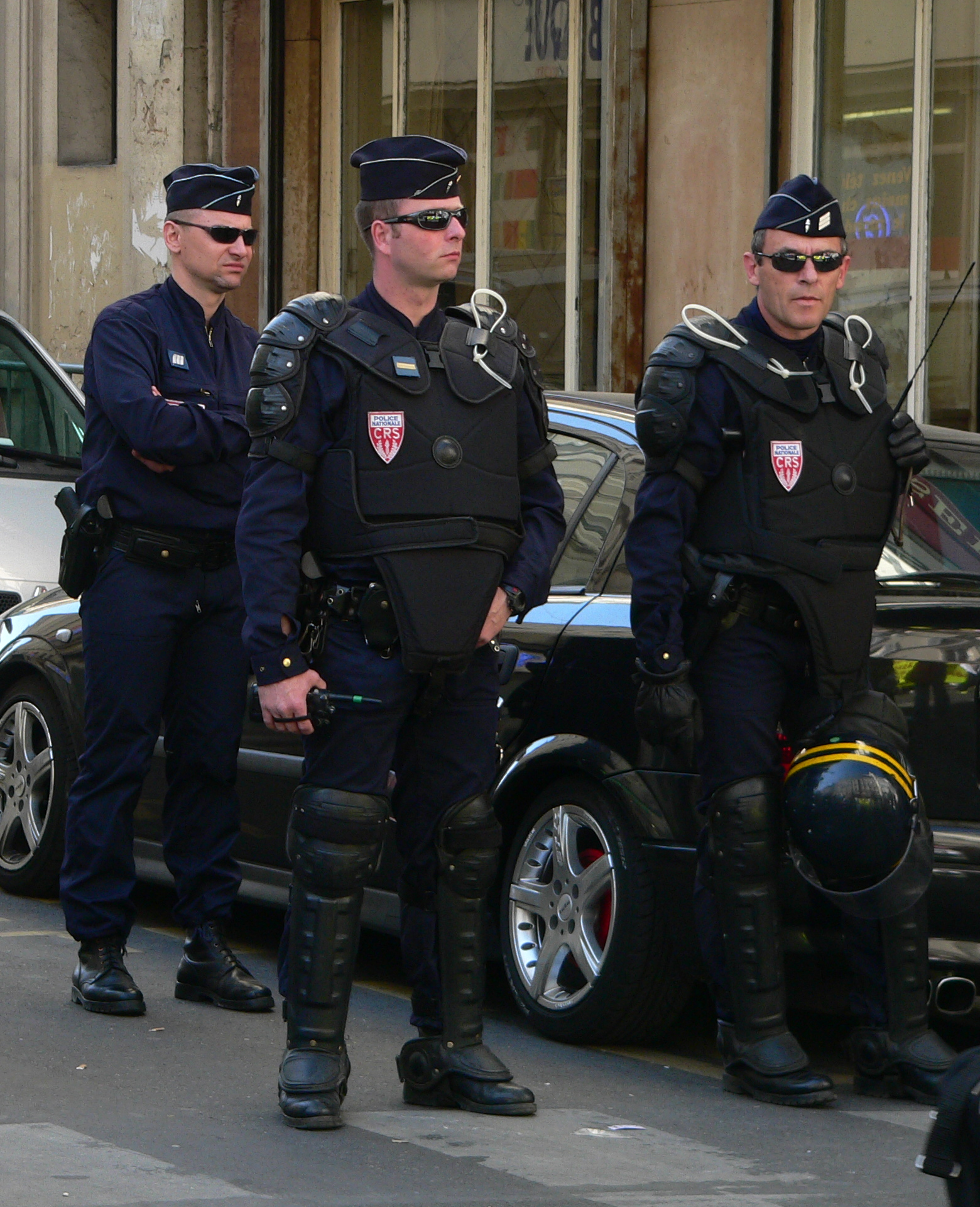 CRS Image:CRS tenue maintien ordre p1200484.jpg